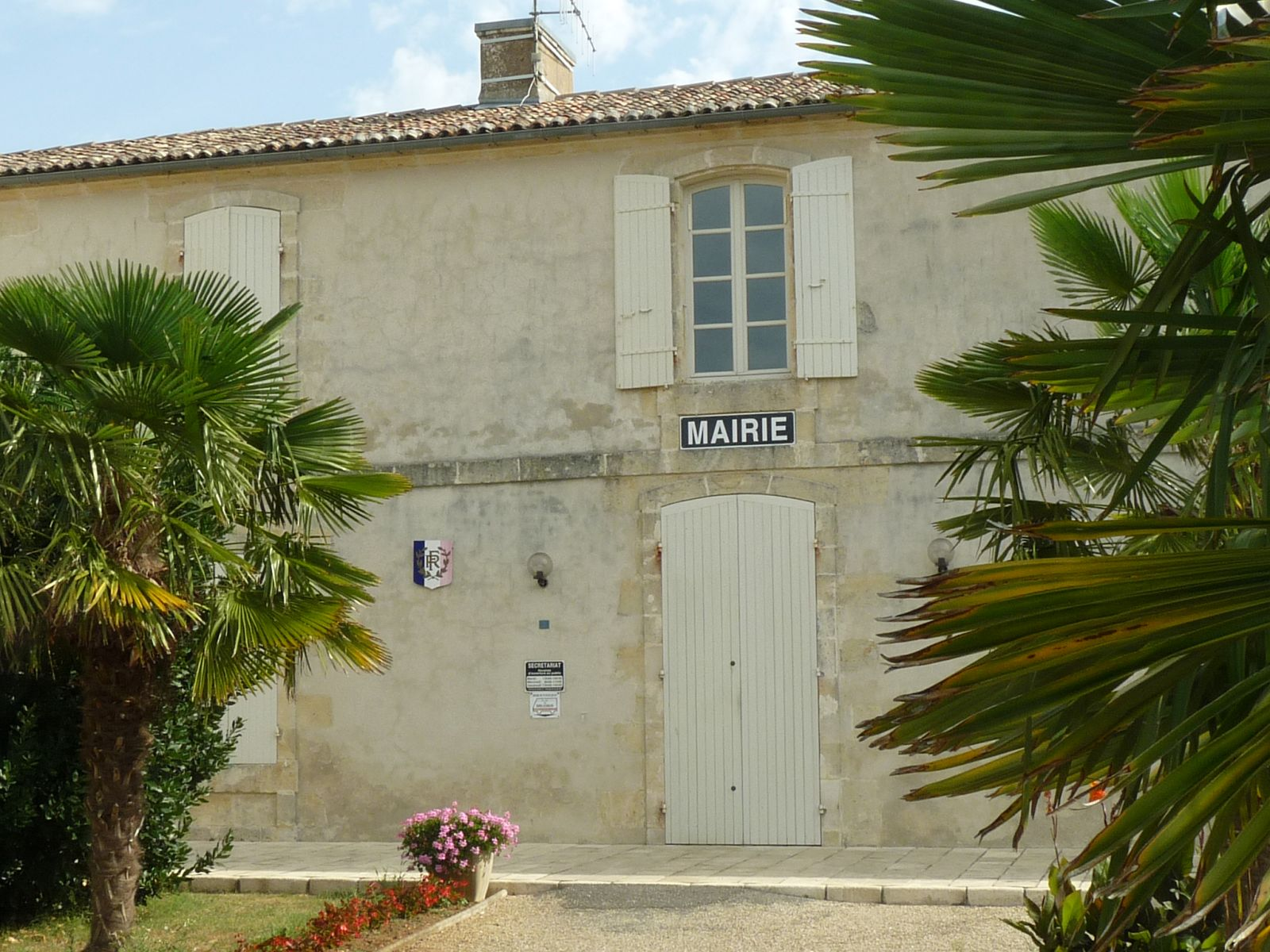 mairie de Champagnolles (17), France